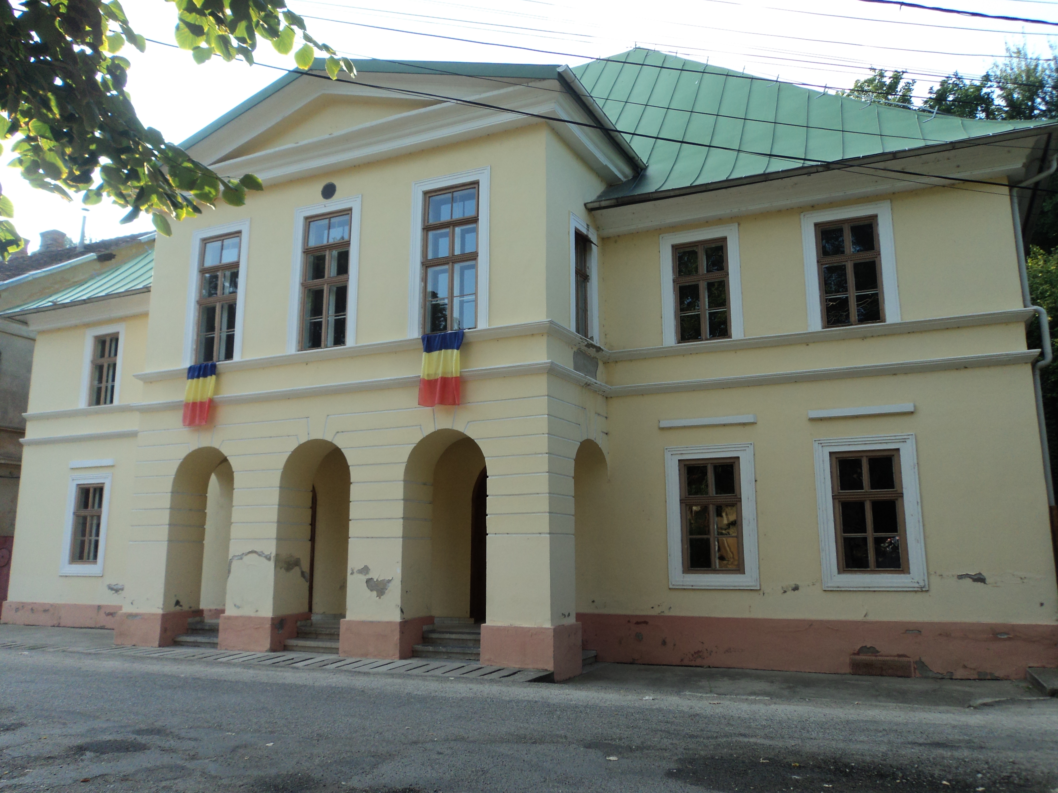 4000.3000,4MB